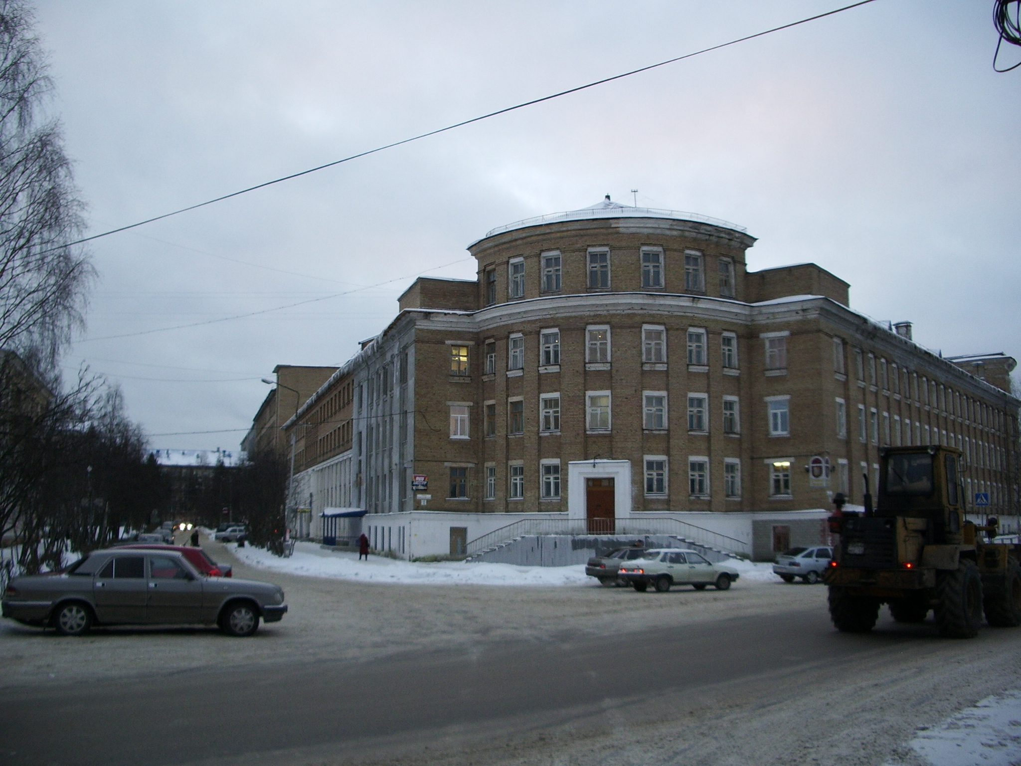 Ухтинский государственный технический университет